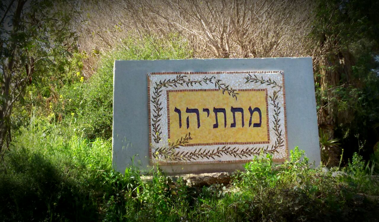 שלט הכניסה לישוב מתתיהו, מועצה איזורית בנימין, ישראל